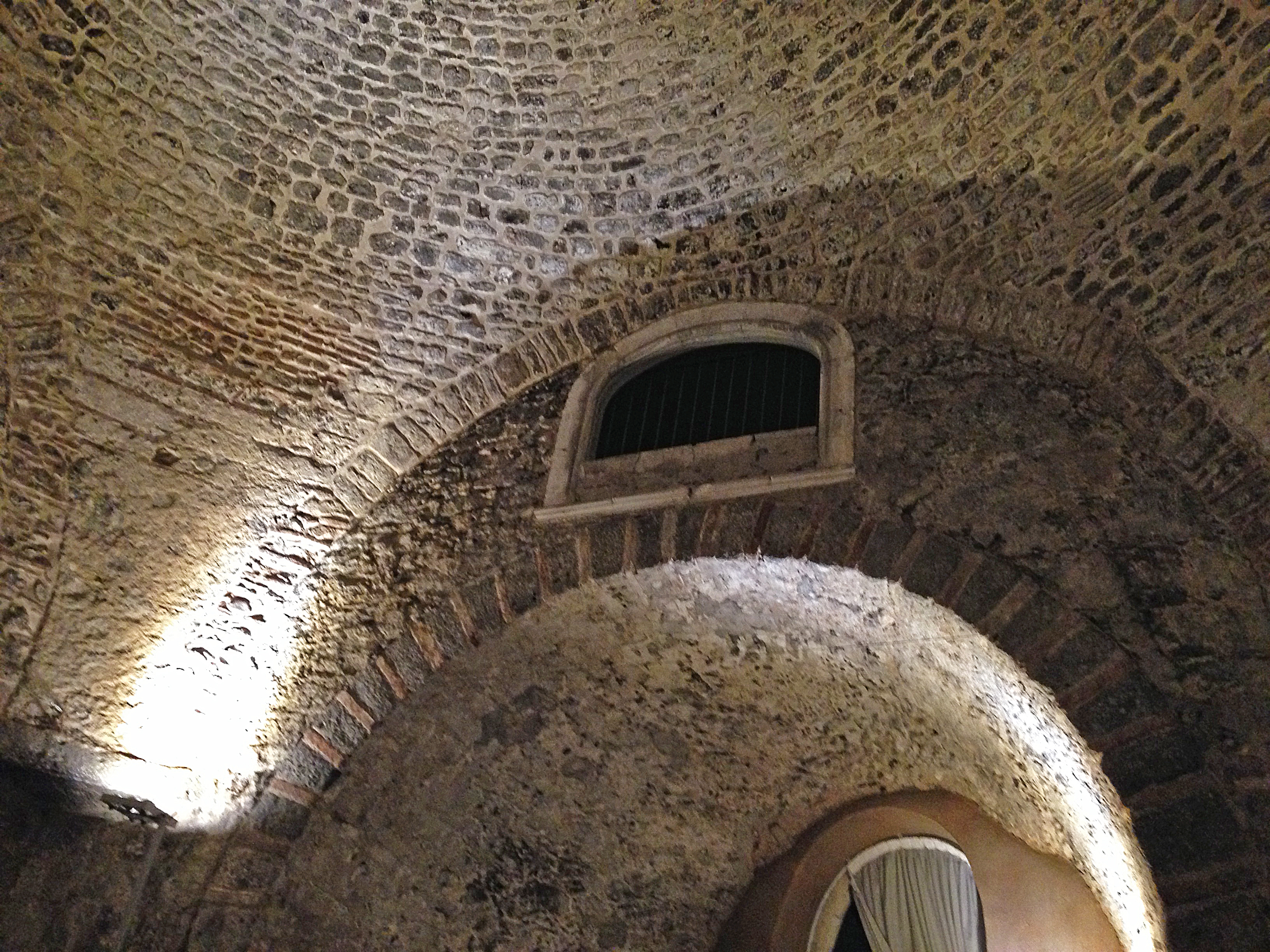 Cappella Bonajuto